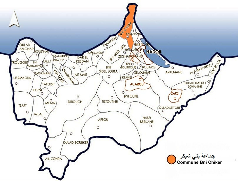 commune Bni Chiker جماعة بني شيكر